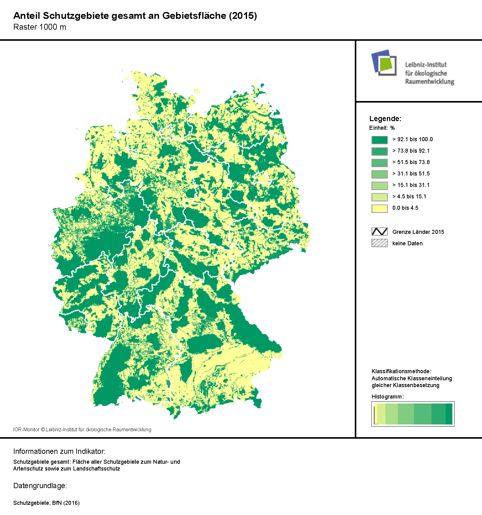 Die Abbildungen zeigen die Anteile der Schutzgebiete an der Gebietsfläche auf Kreisebene. Zur Ermittlung der Indikatorwerte wurde der Quotient aus der Summe der Schutzgebietsflächen und der Gebietsfläche der jeweiligen Flächenbezugsgröße berechnet und entsprechend dargestellt.